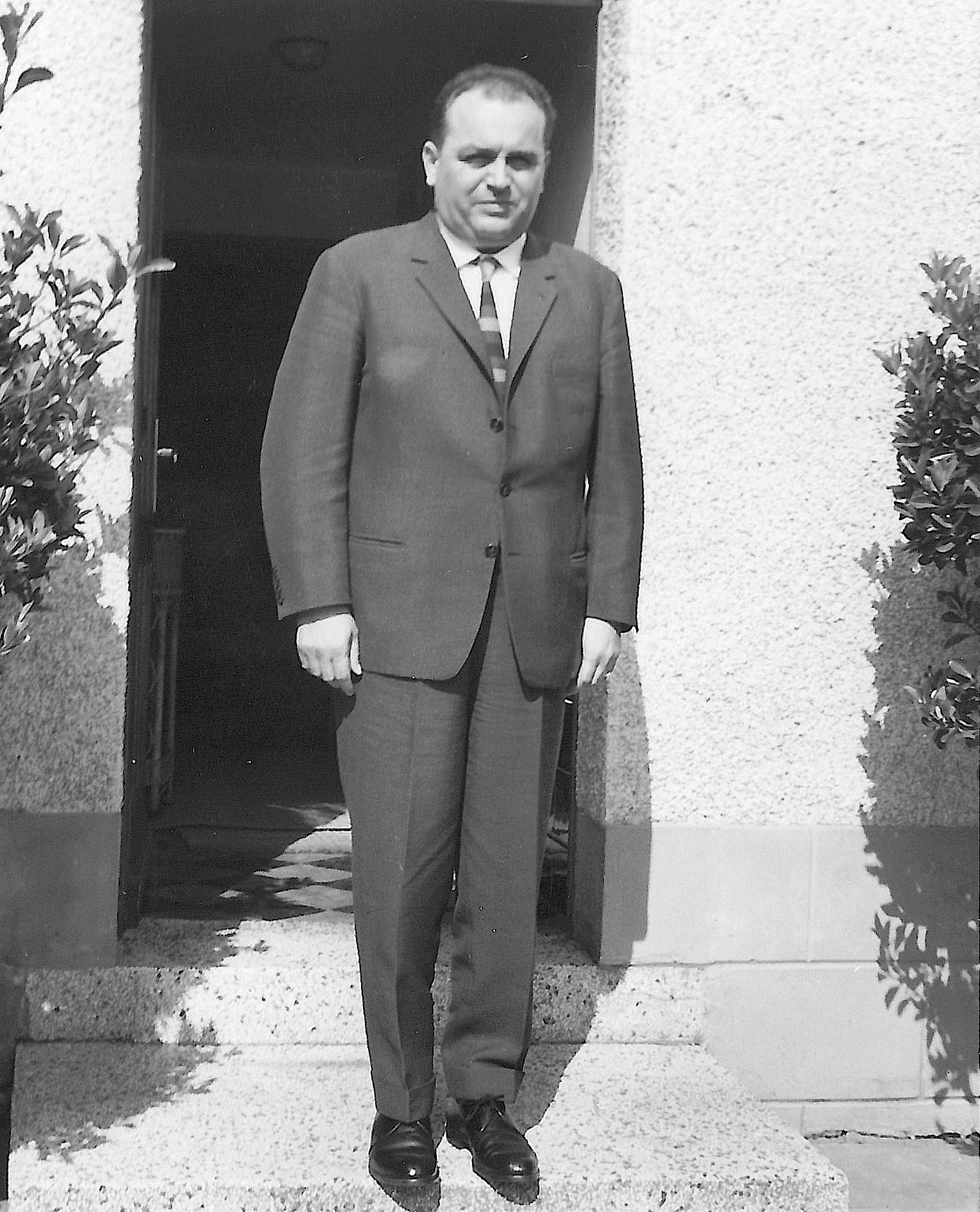 Hans Welsch im Juni 1961